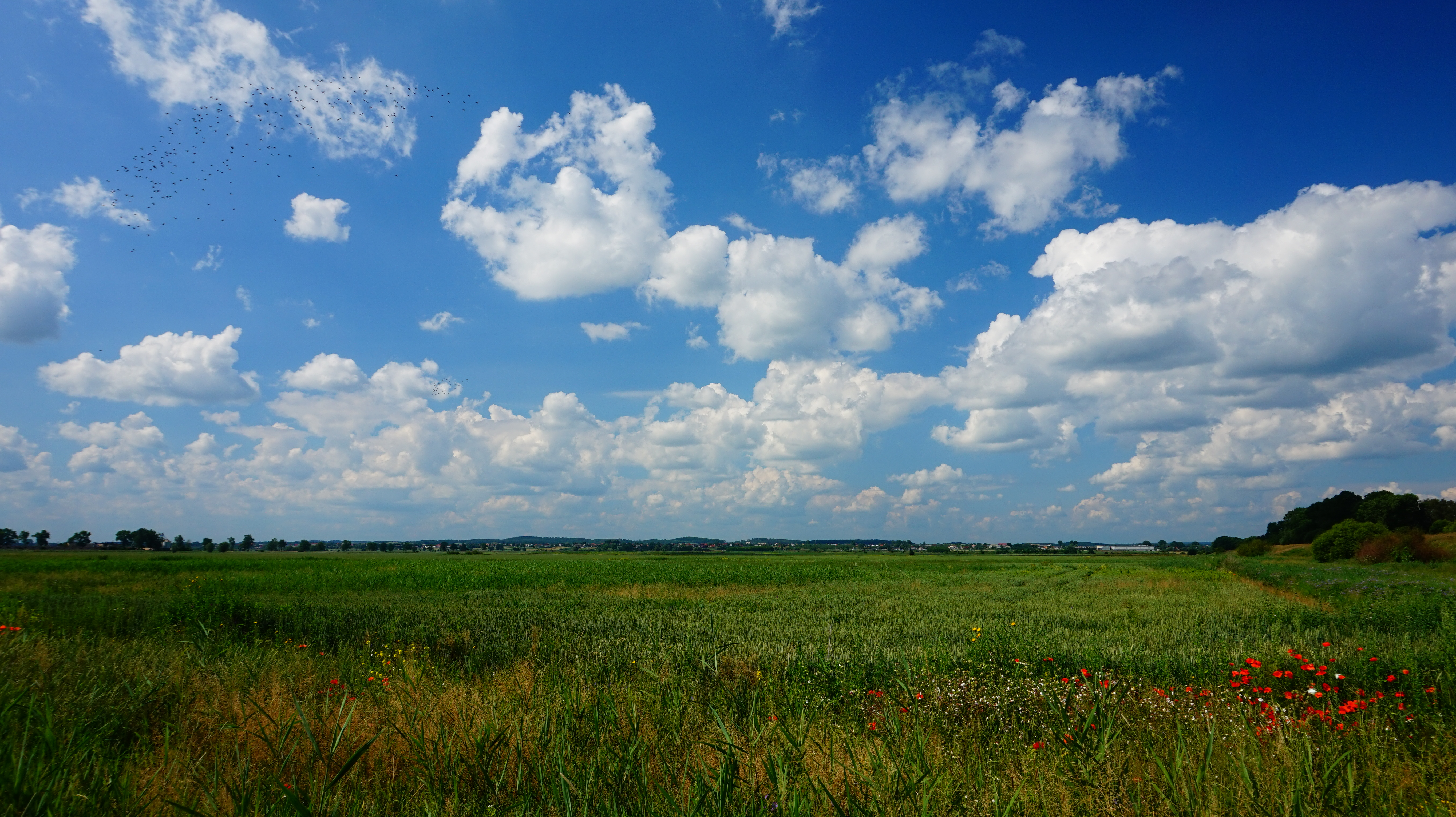 Okolice wsi Różyny, pow. gdański